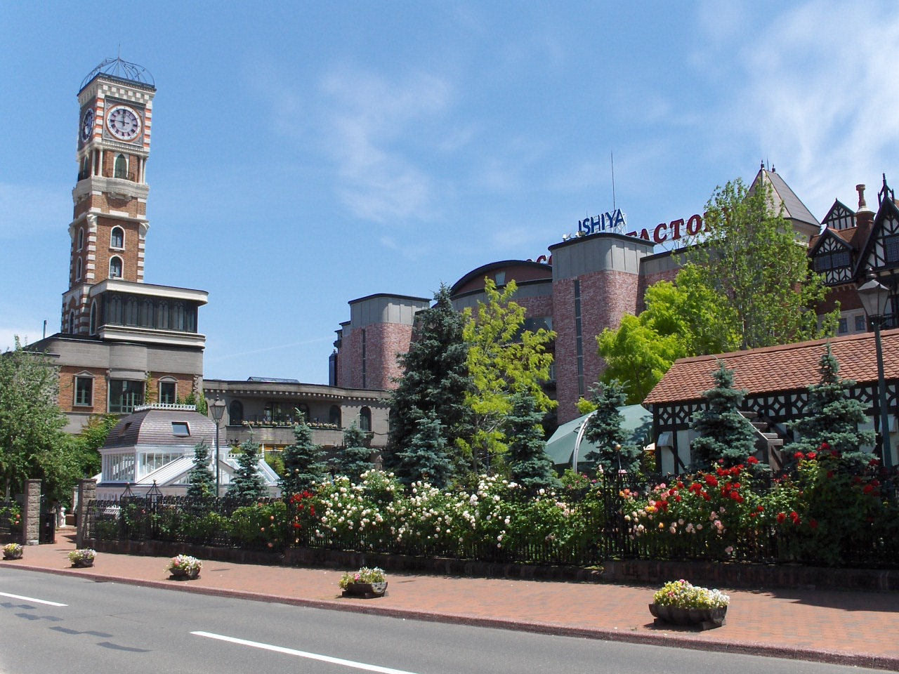 石屋製菓 撮影者：ダブルで ２００７年撮影